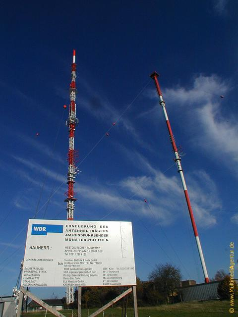 Alter und neuer Sendemasten am WDR-Sender Nottuln